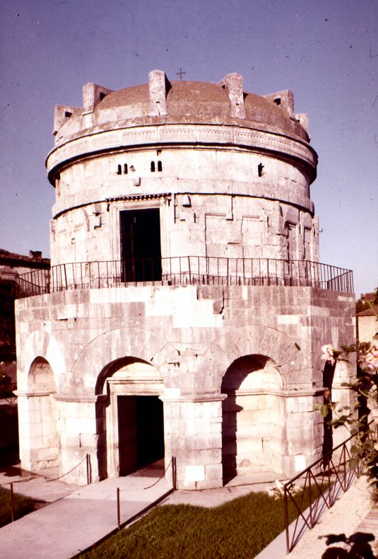 Mausoleo di Teodorico diapositiva di --Madaki 12:11, Gen 13, 2005 (UTC)